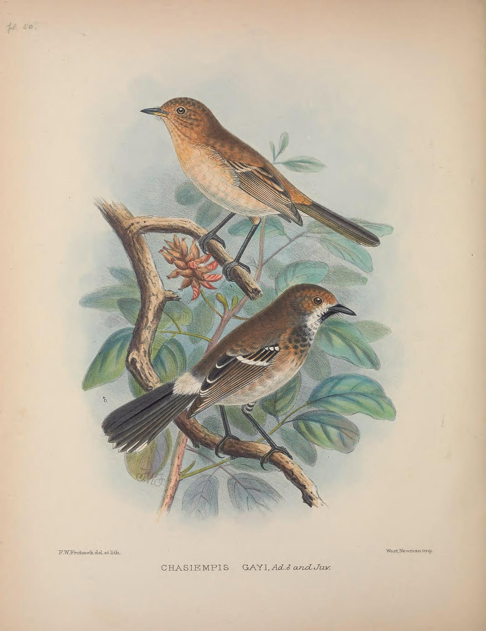 FW.WTaha.vrk. del etlitk. We st,~Ne wnan imp CHAS1EMPIS GAXI.Acl-J CLruLJuv